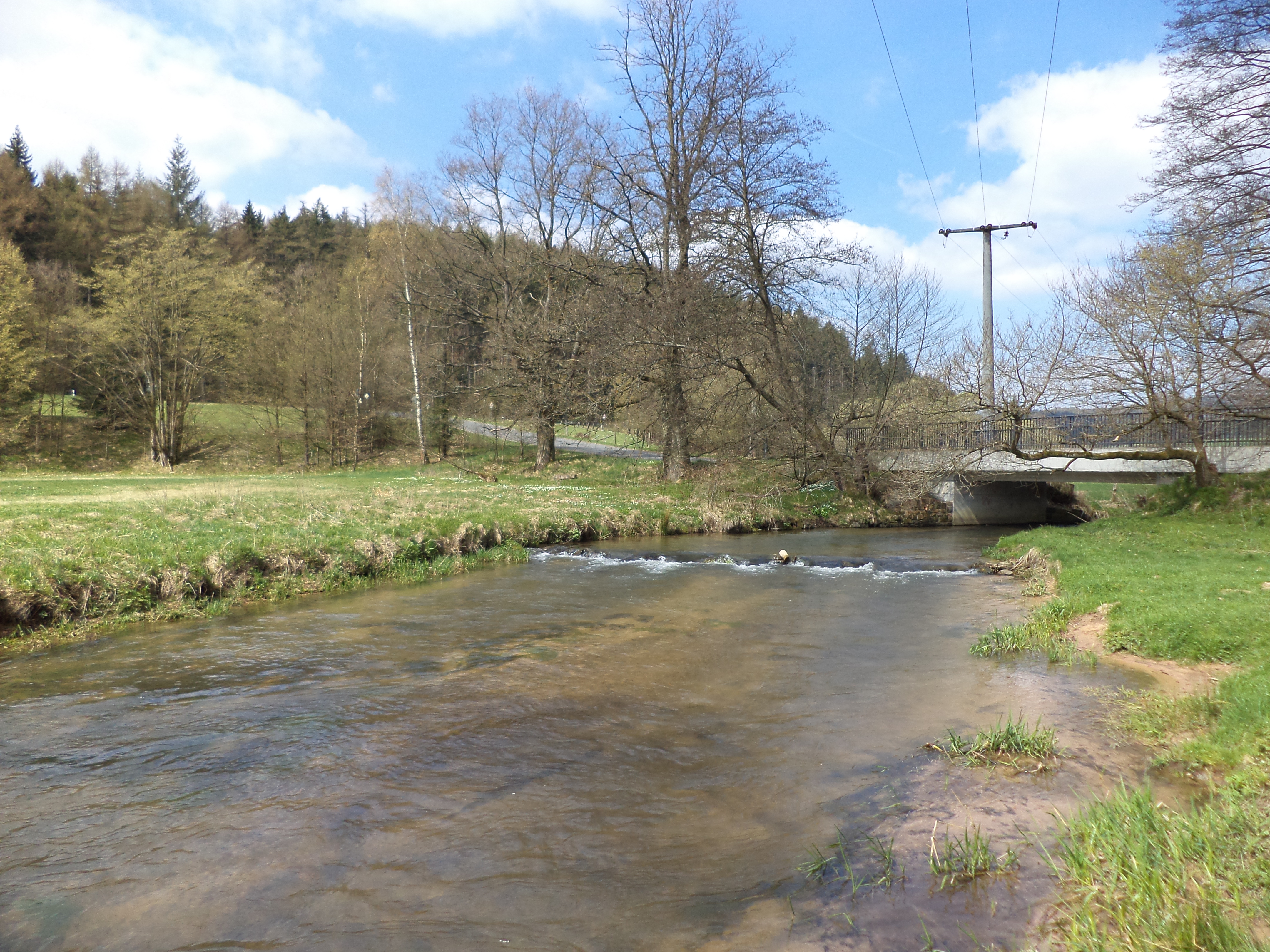 Die Jossa an den Barrackenhofen